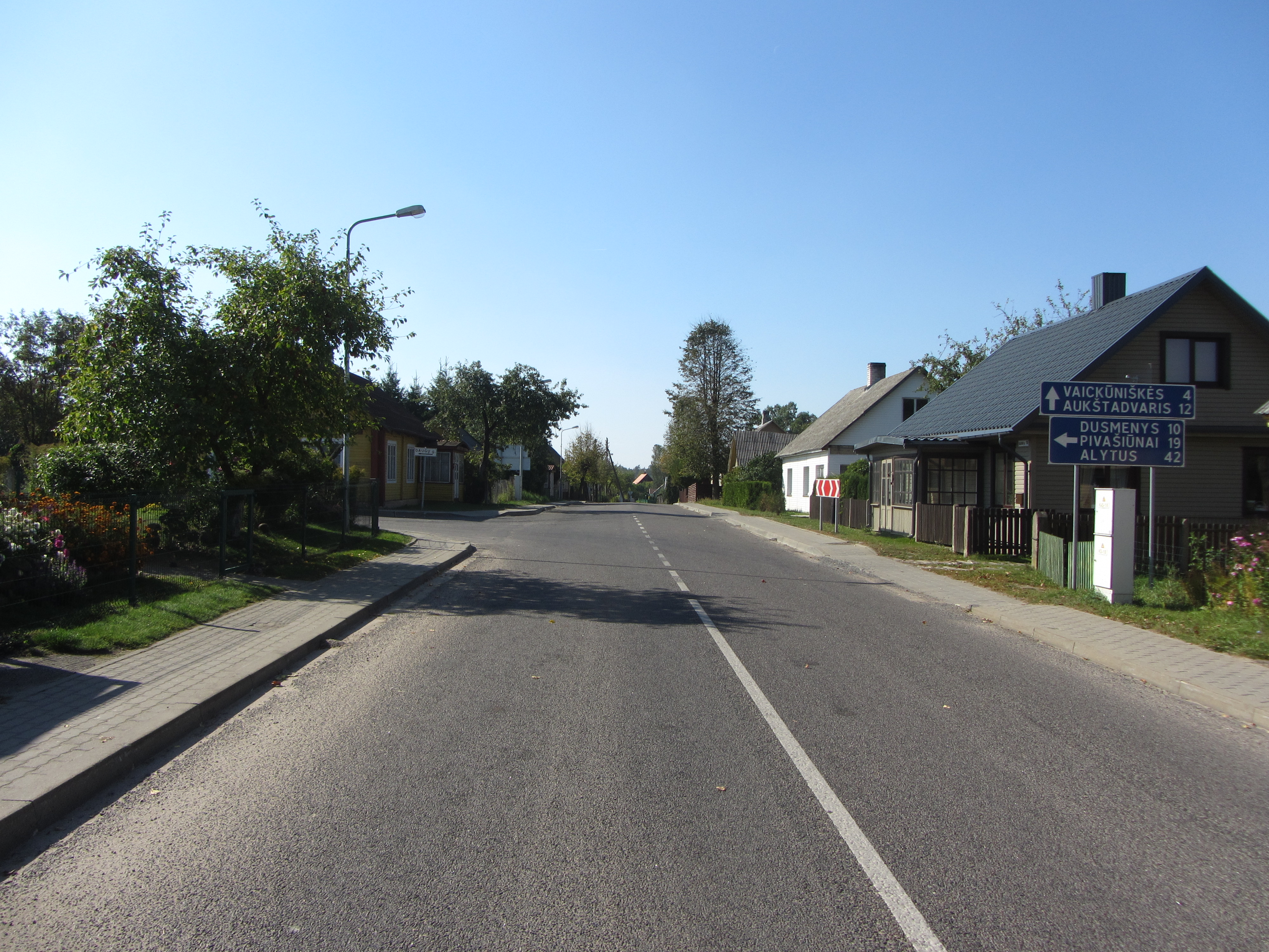 Onuškis, Lithuania